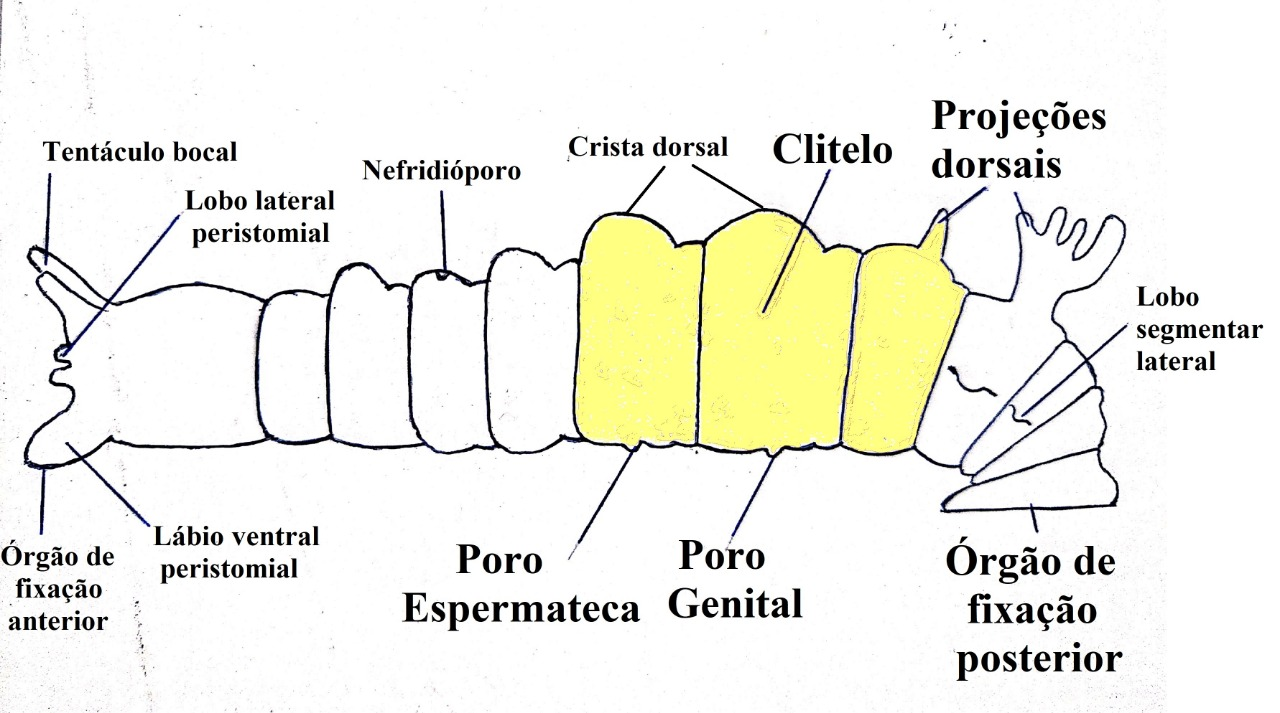 Vista lateral de uma Branchiobdellida geral para mostrar a maioria das características externas